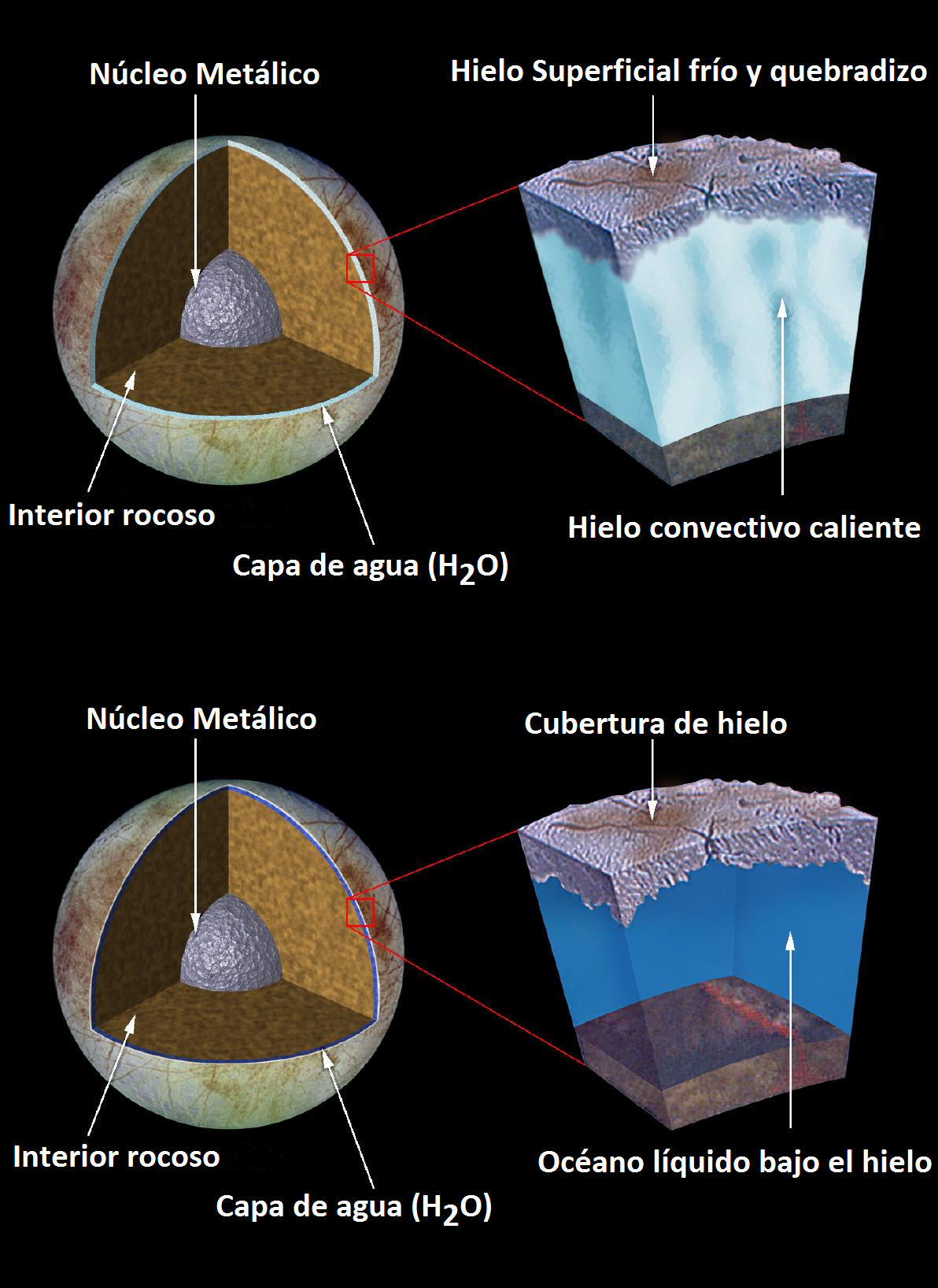 Estructura interior del satélite Europa